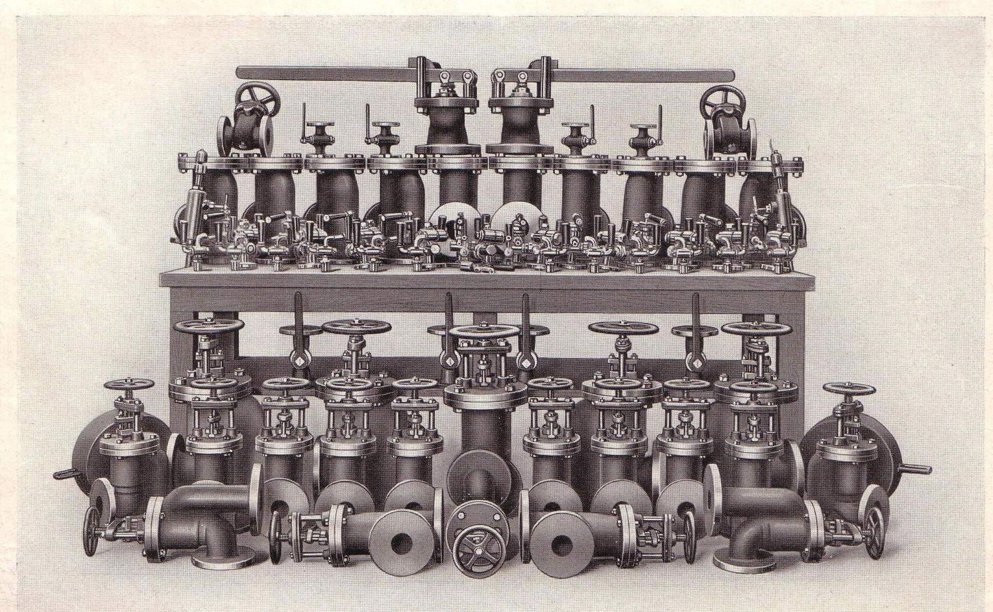 Kesselarmaturen